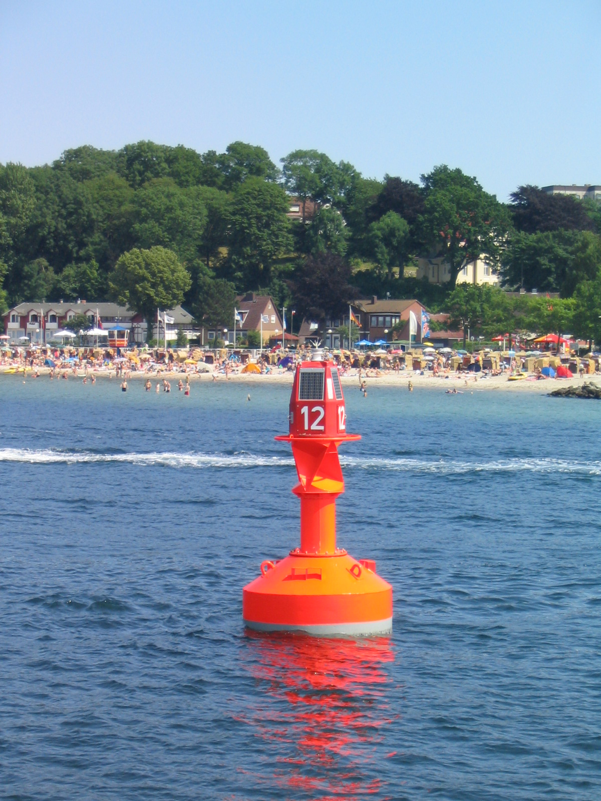 Buoy and beach on the Kiel Fjord at Moeltenort; Boje und Strand von Möltenort an der Kieler Förde